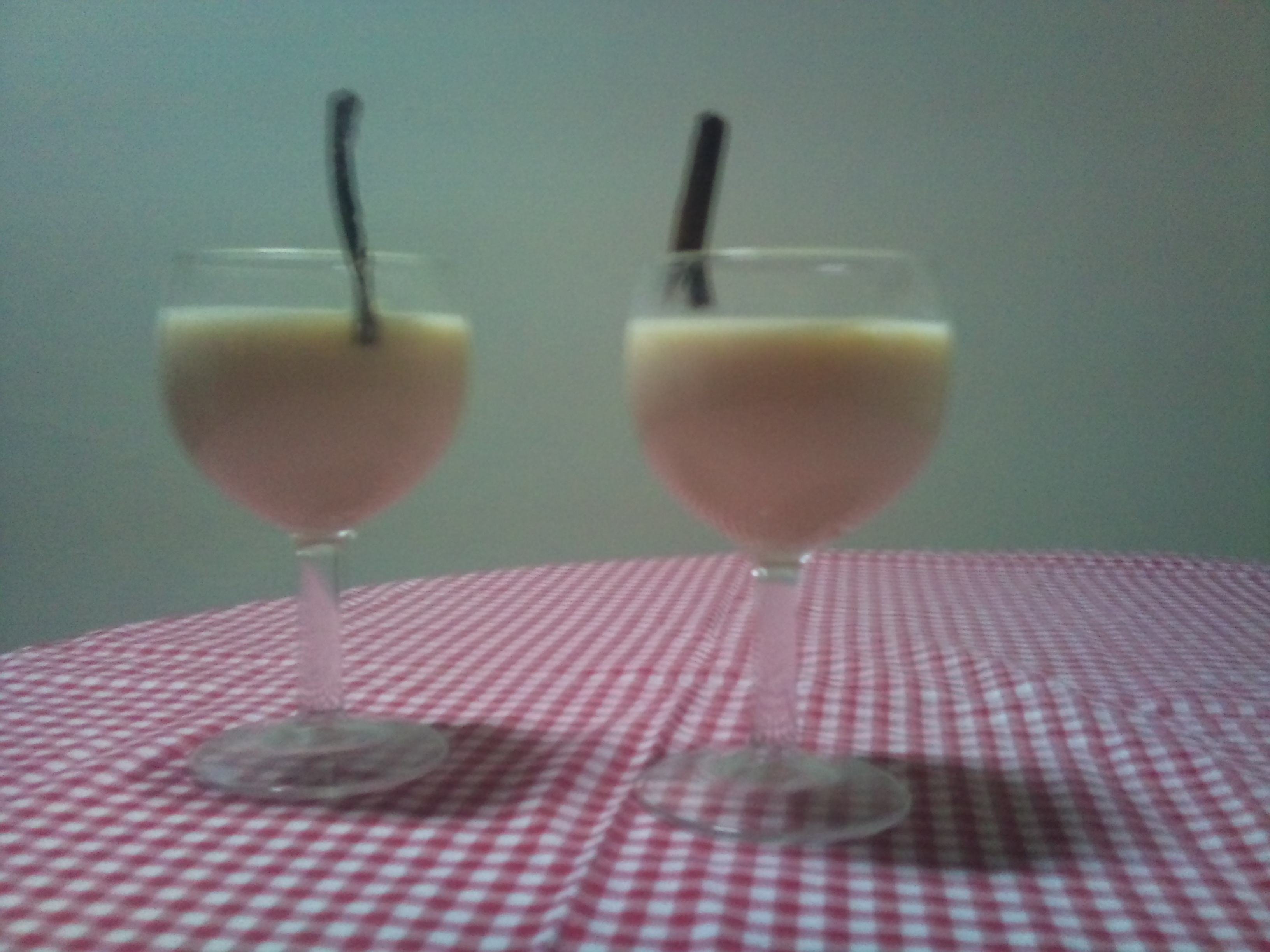 "Rompon Chilote"